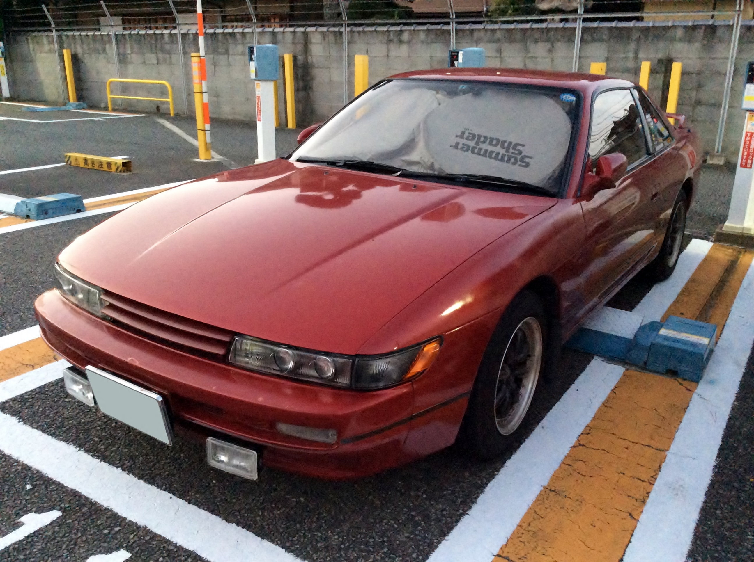 S13型日産・シルビアK'sをフロントから撮影。